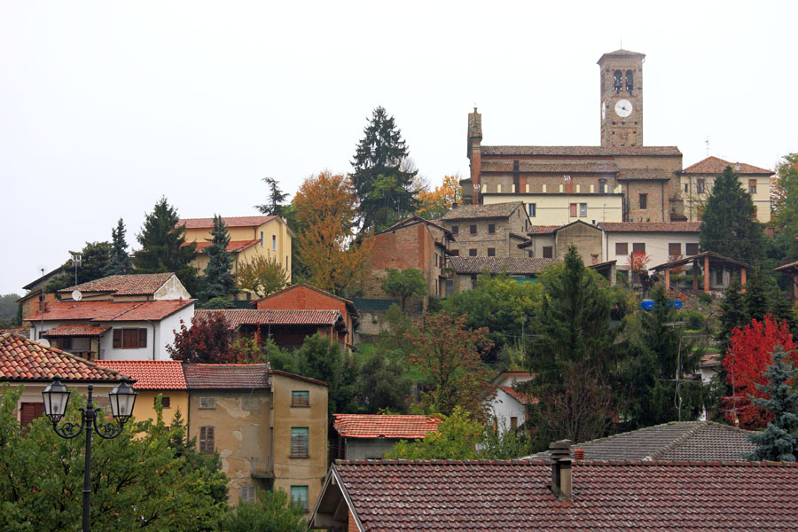 Veduta autunnale di Fortunago (PV)